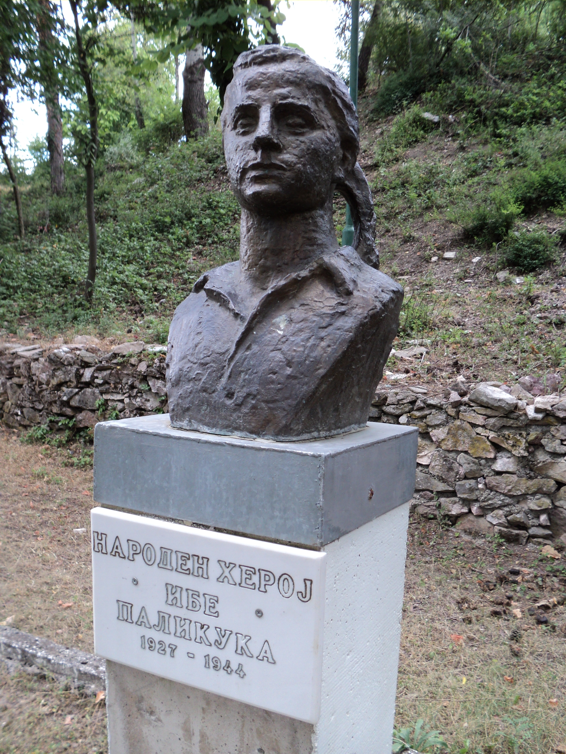 Bista Ibe Palikuće u Kičevu. Self-made. Jul 2011.